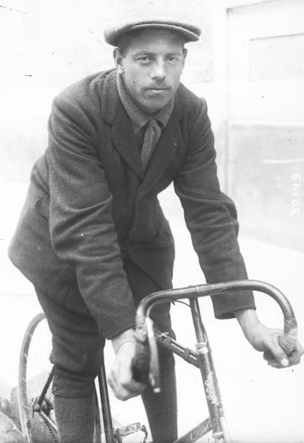 Léon Scieur portrait du coureur cycliste avant le départ